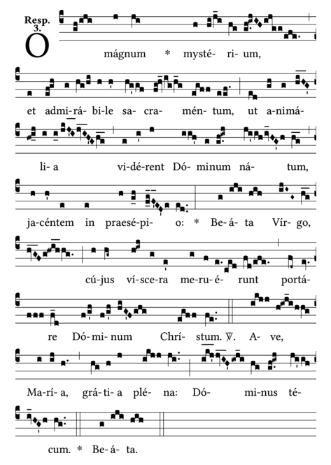 Gregorianisches Responsorium O magnum mysterium